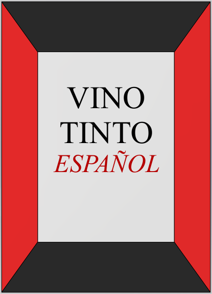 Hemmasnickrad illustration som är tänkt att återspegla den ungefärliga design en Vino Tinto-flaska hade på den tiden vinet öht såldes.